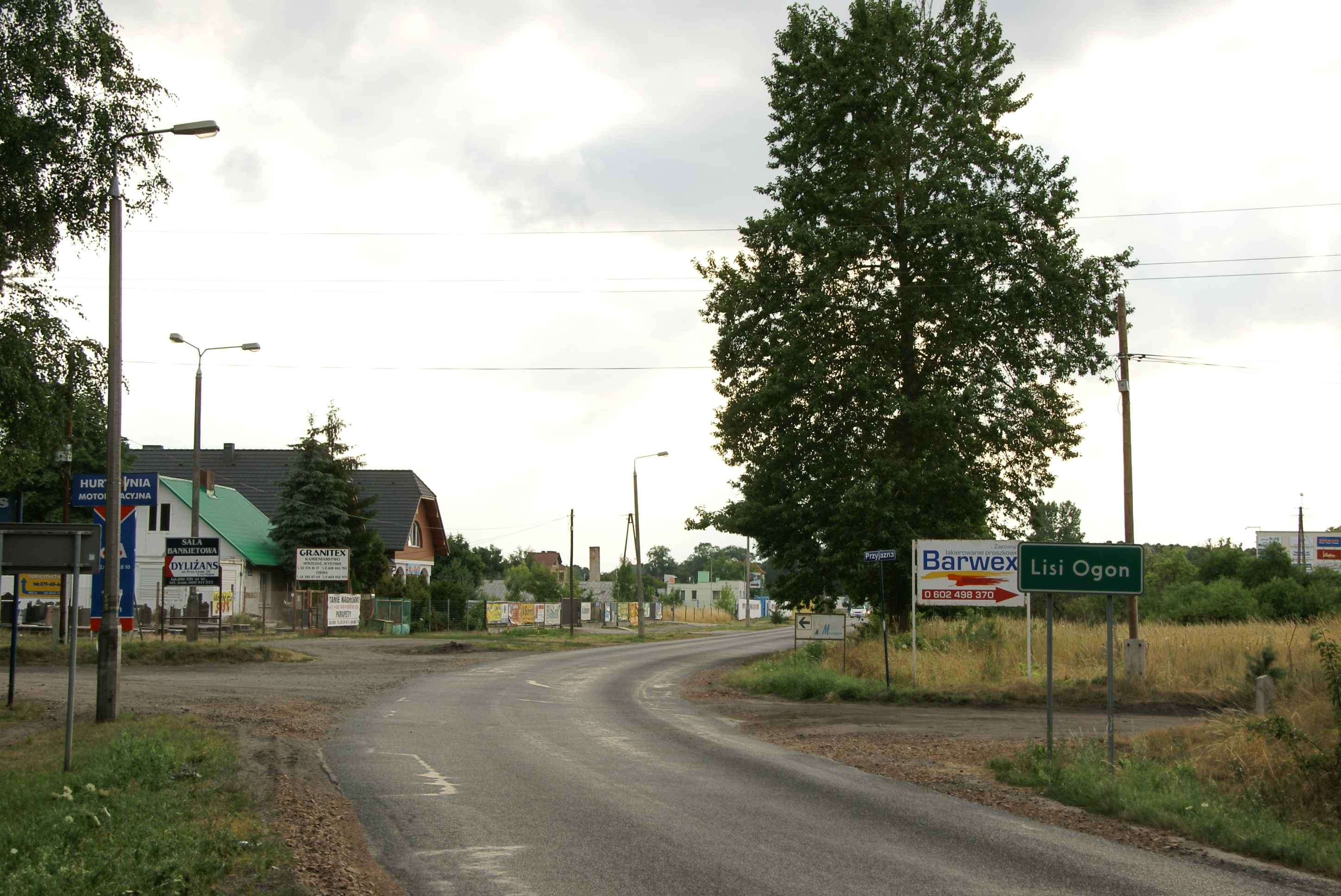 Lisi Ogon - wieś w Polsce położona w województwie kujawsko-pomorskim, w powiecie bydgoskim, w gminie Białe Błota. Wjazd od strony ul. Łochowskiej w Bydgoszczy.